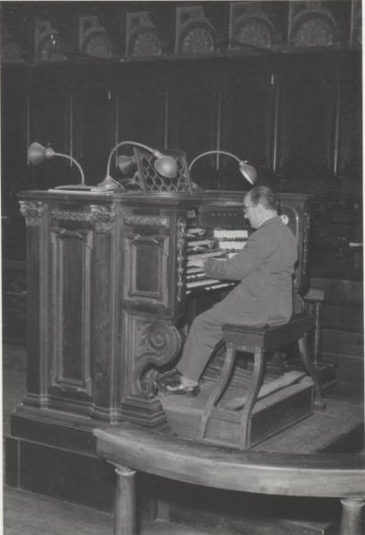 Mario Voltolina all'Organo Mascioni della Basilica del Santo a Padova